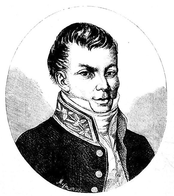 Alojzy Feliński 1771-1820